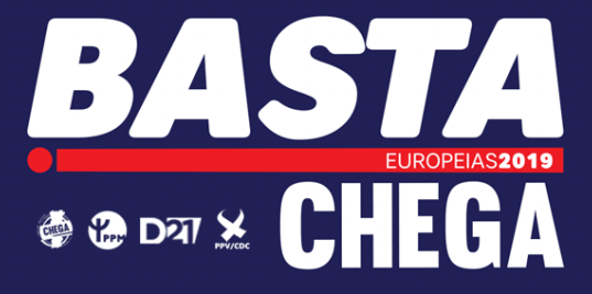 Coligação partidária Basta! , fundada pelo Chega!, PPM, PPV-CDC e Democracia 21